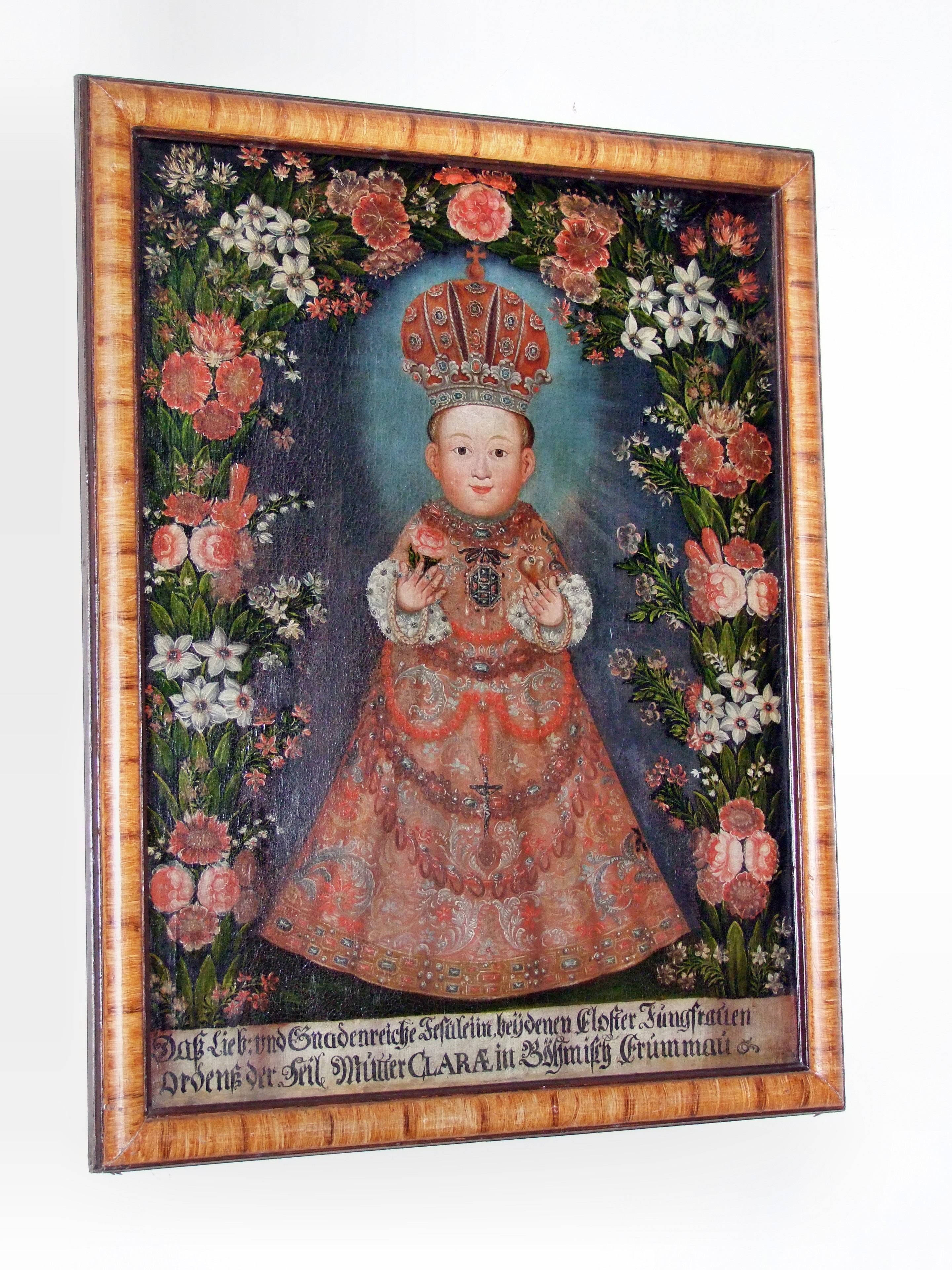 Gemälde in St. Johann Nepomuk (Memmingen)